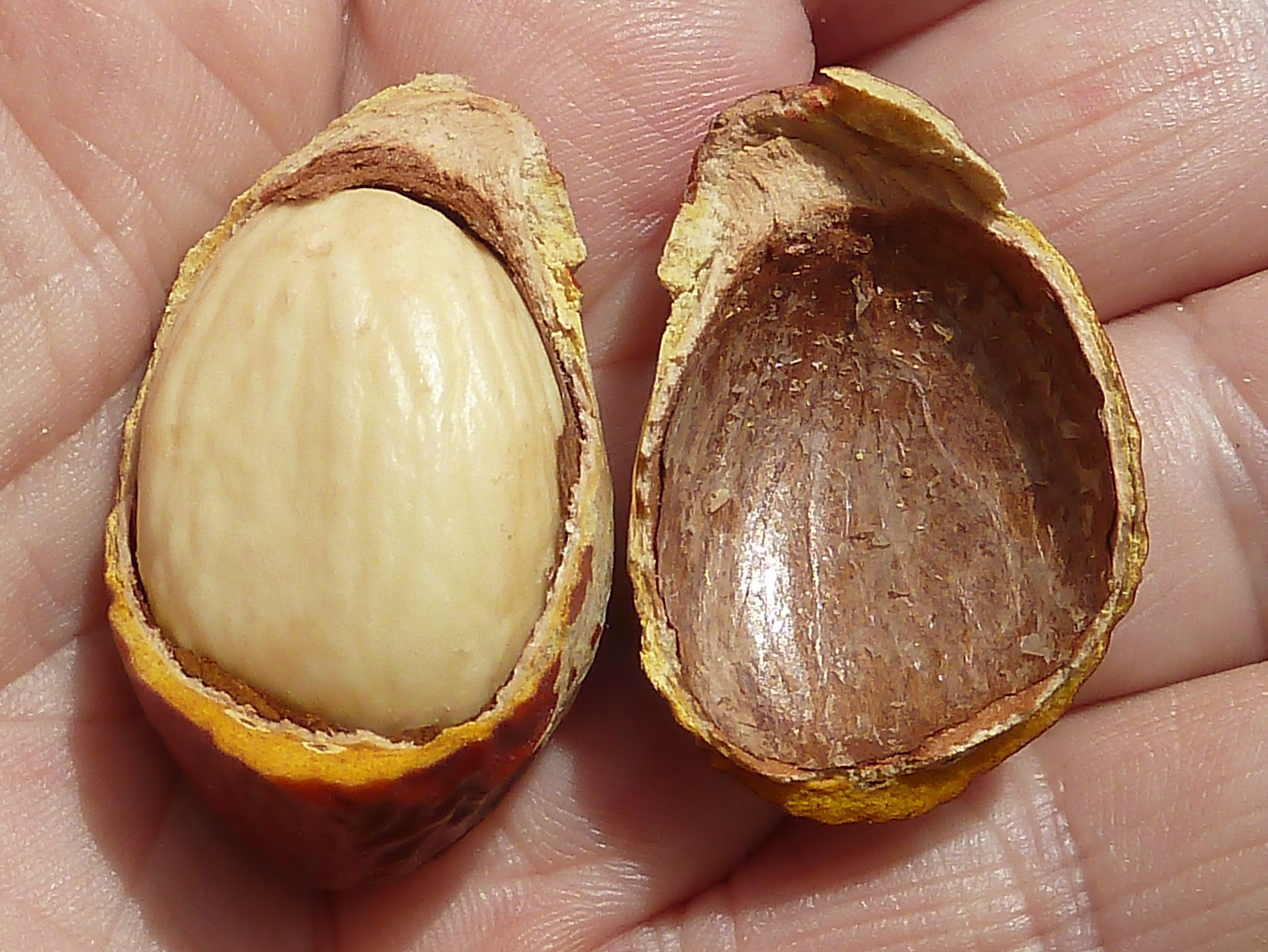 Cycas revoluta (Sagú, Palma de Sagú, Cica del Japón, Palma de iglesia) - Semilla abierta con la testa de 3 capas: la sarcotesta externa de color rojizo, la sclerotesta mediana endurecida y la endotesta interna fibrosa; en el centro, los 2 cotiledones soldados. - Cultivado/ornamental, avda de la Libertad Albatera, Provincia de Alicante (España).